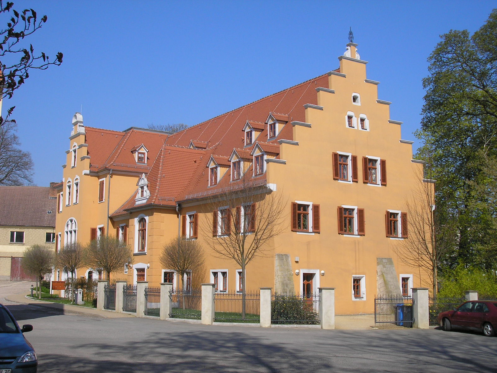 Das ehemalige Rittergut (heute Sitz der Stadtverwaltung) in Schkölen (Thüringen).